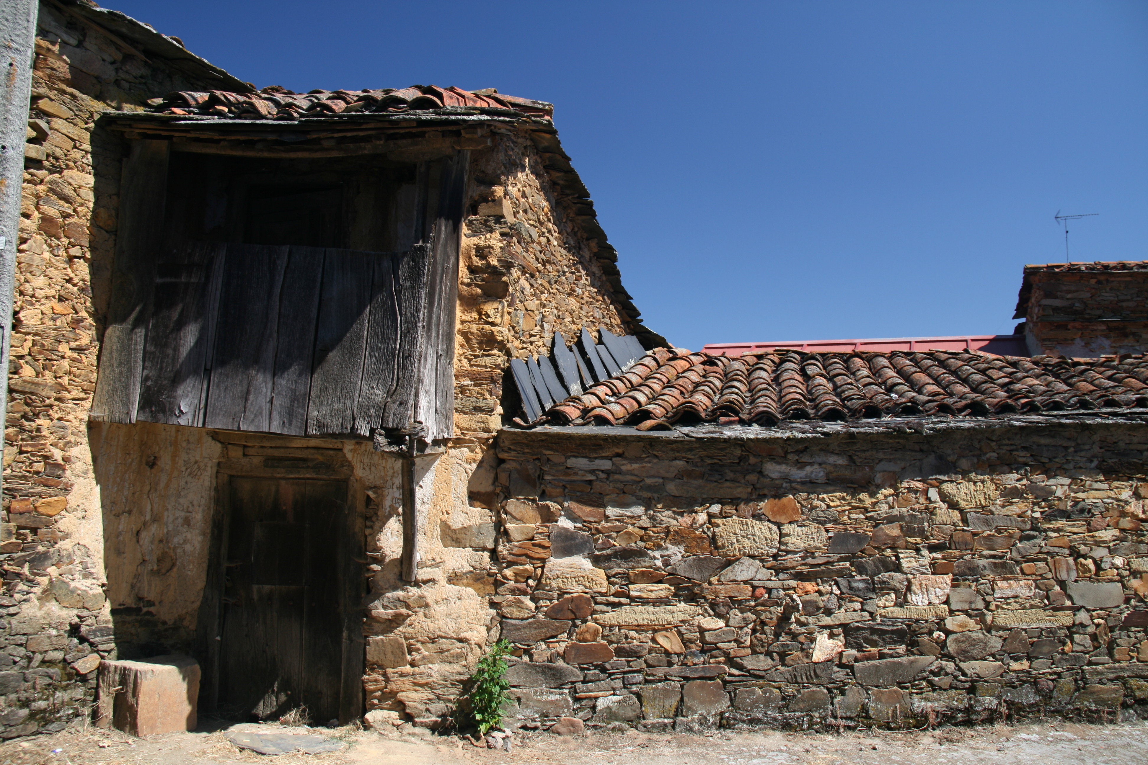 Balcón alistano